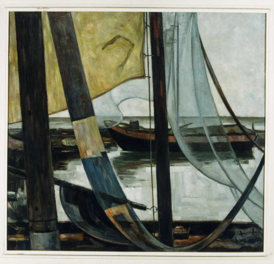 Fischerboote